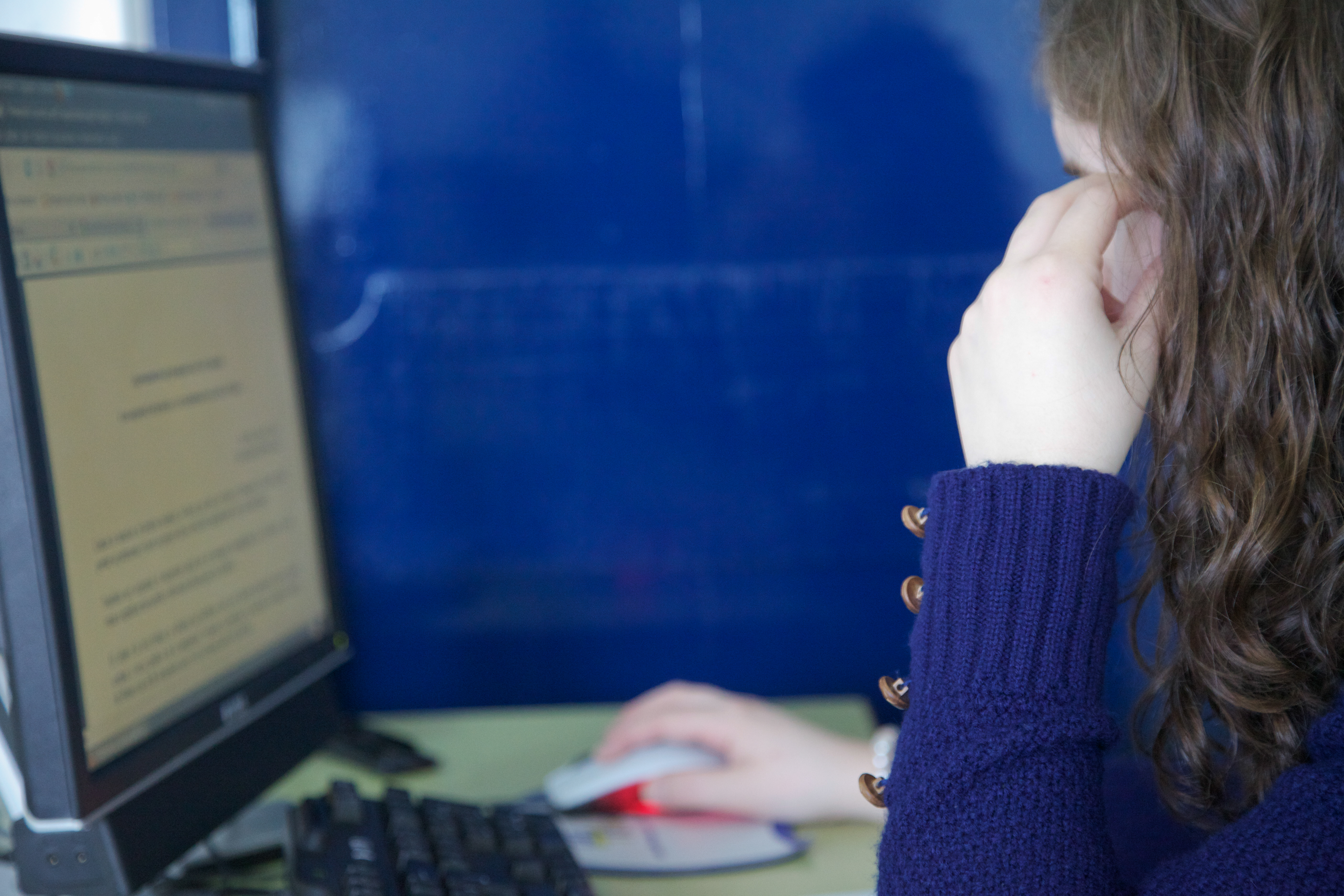 Concurso de Cultura Clásica Odisea. Foto tirada na Biblioteca do IES "Manuel García Barros", A Estrada, Galiza